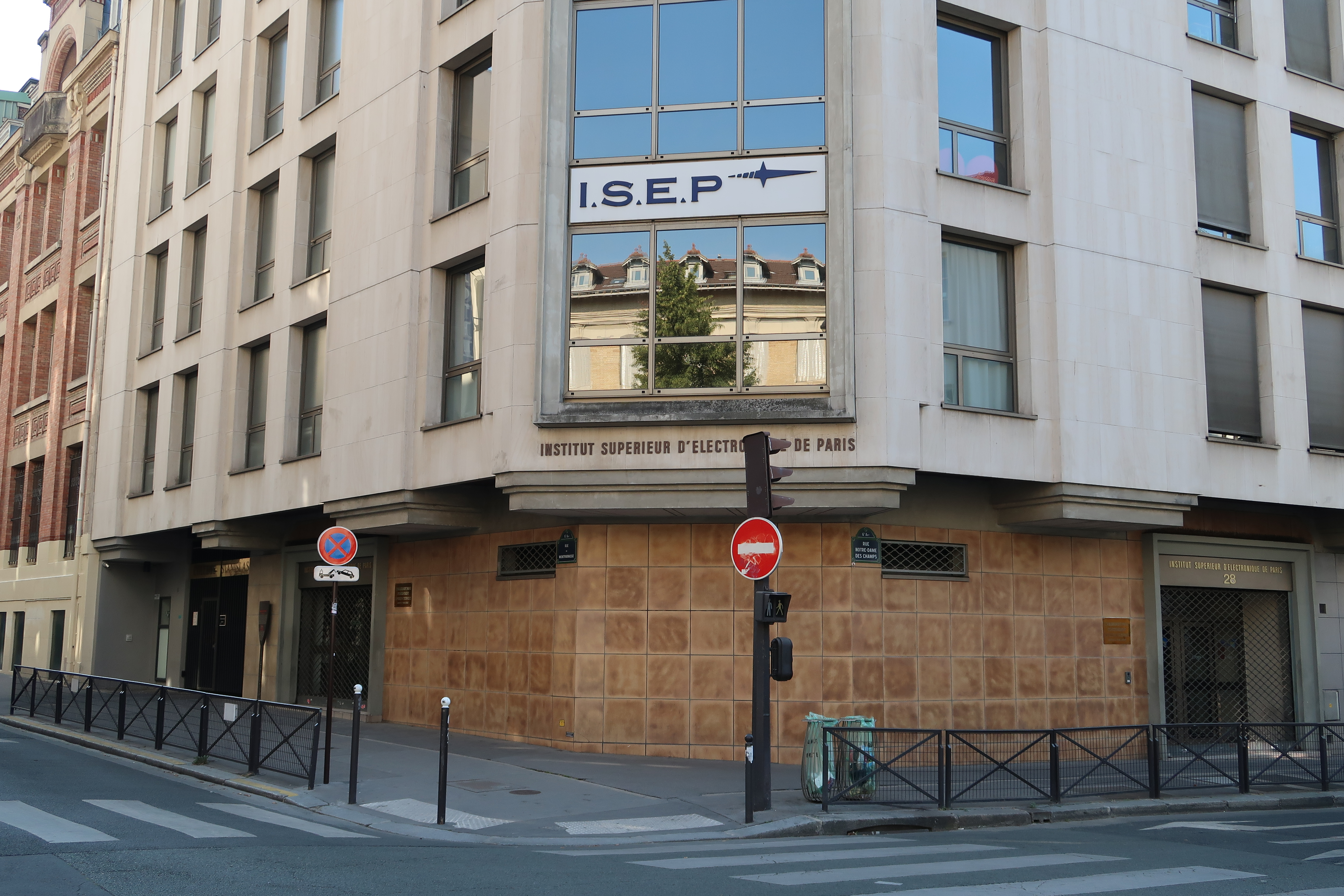 Institut supérieur d'électronique de Paris (ISEP), 28 rue Notre-Dame-des-Champs (Paris, 6e).